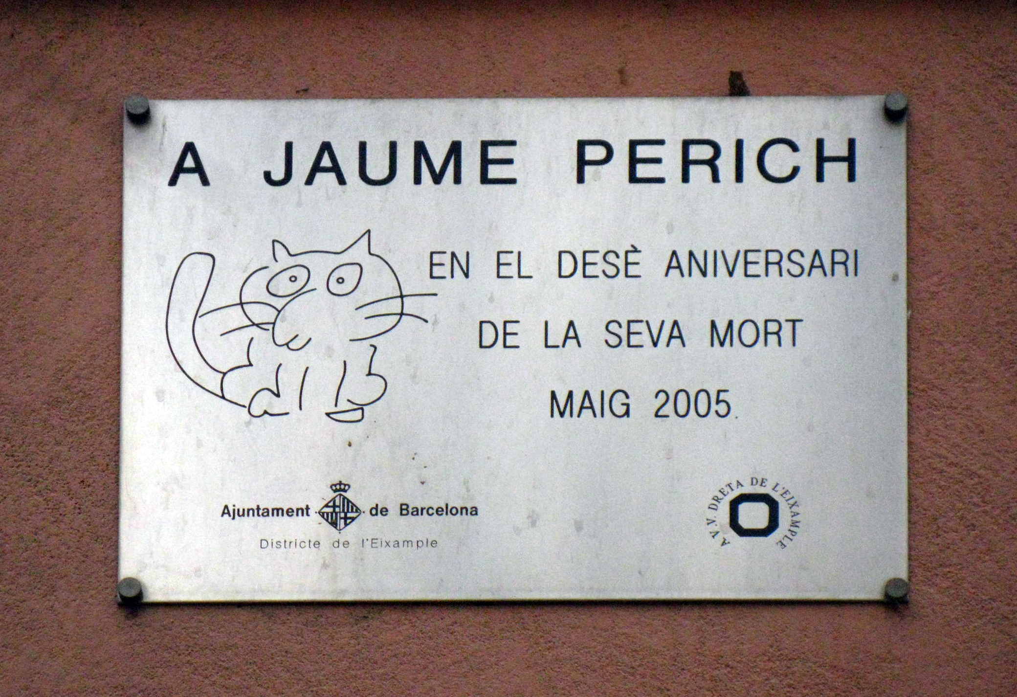 Jaume Perich. Gran Via de les Corts Catalanes, 657 bis -Jardí Jaume Perich- (Barcelona)